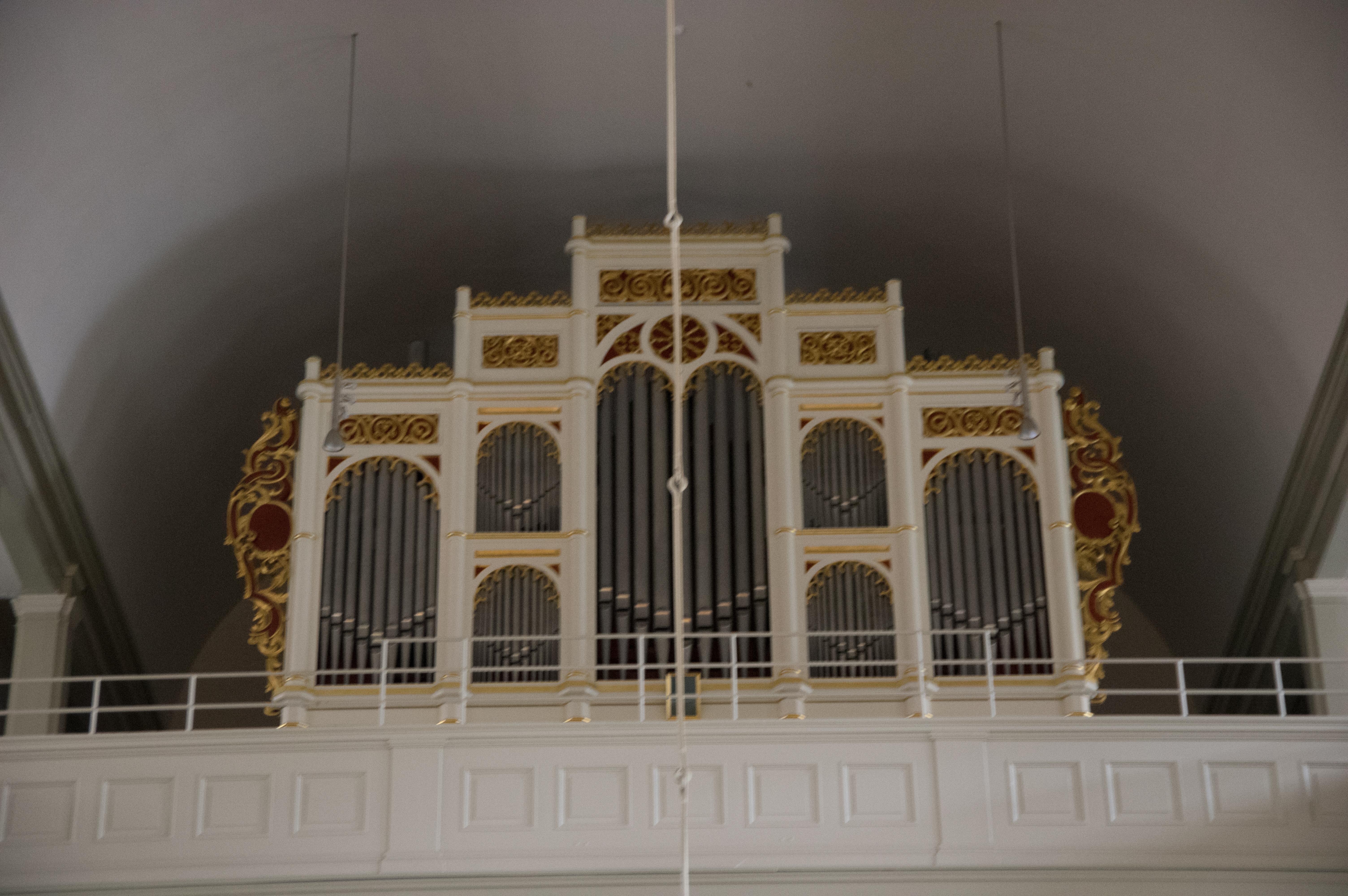 Walsrode in Niedersachsen. Die Stadtkirche steht unter Denkmalschutz.